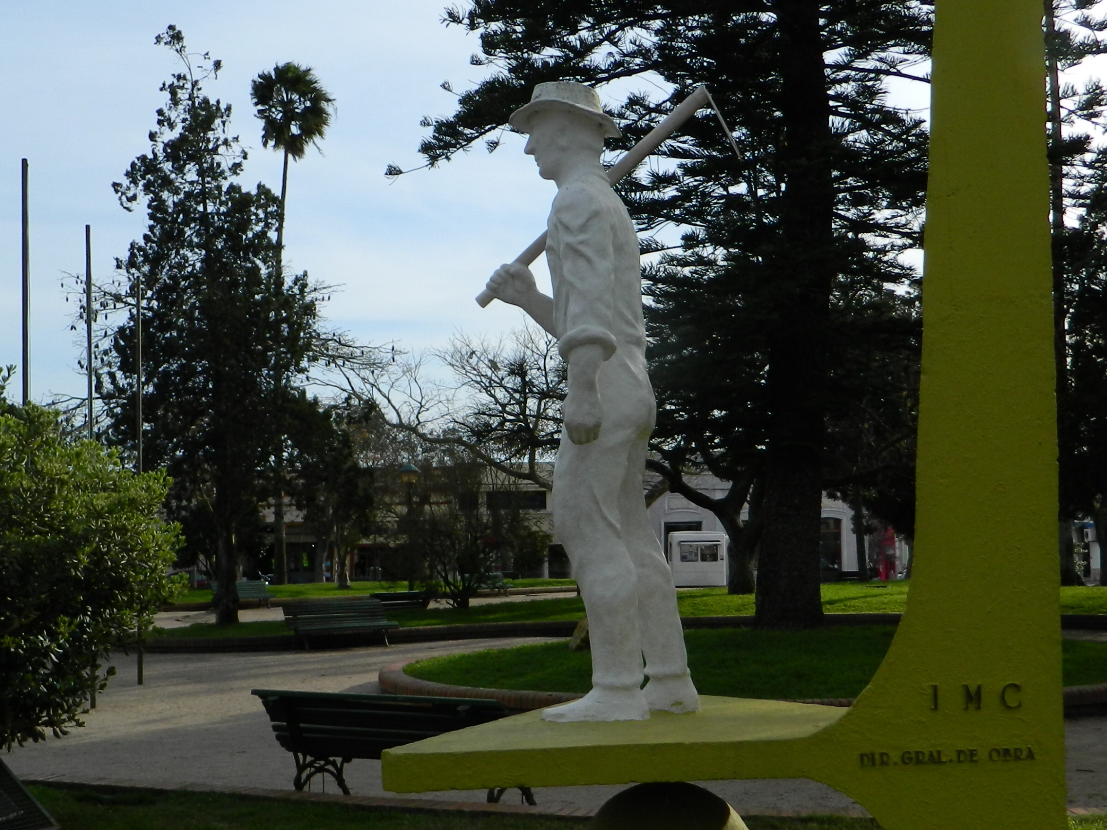 Este monumento lo podemos ver en la plaza de Tala, en homenaje a todos los agricultores que plantaban remolacha azucarera